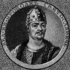 Вел. кн. Ярополк Святославич.